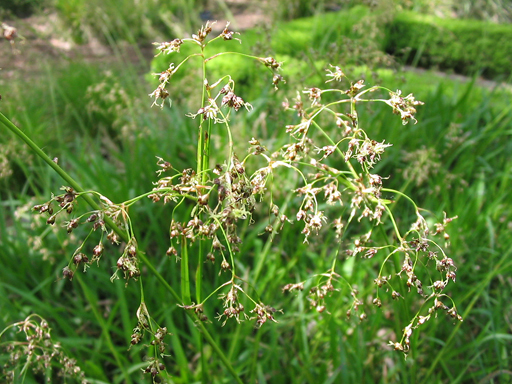 Luzula sylvatica